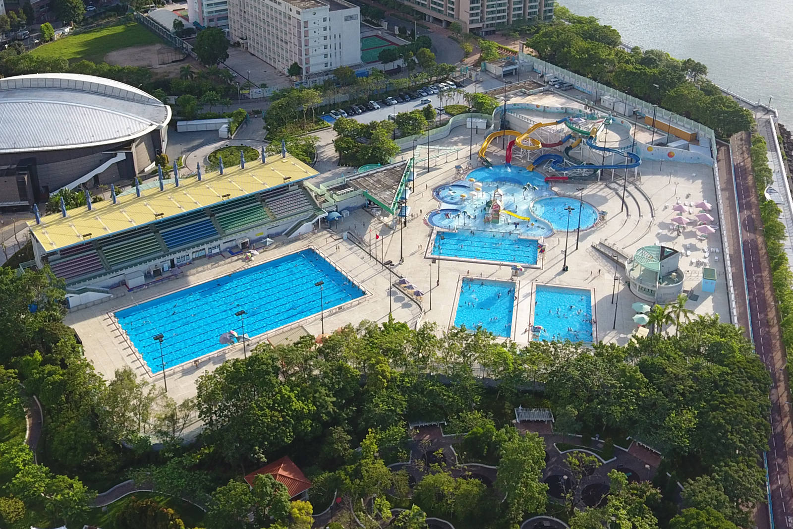 Ma On Shan Swimming Pool